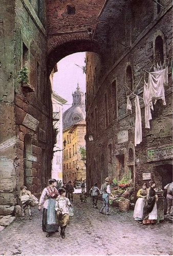 Via della Pedacchia in Rome (rione Campitelli)